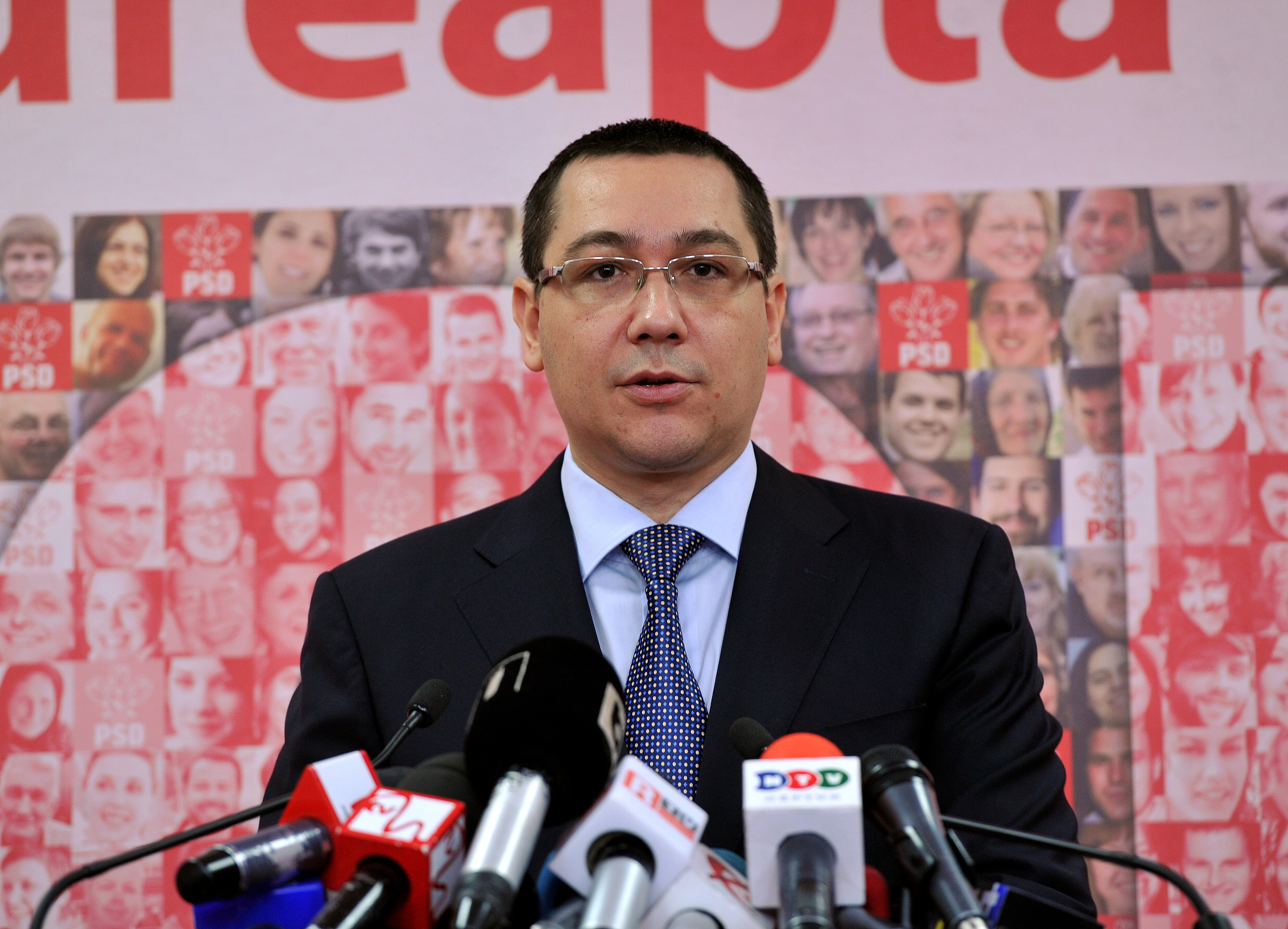 Victor Ponta la reuniunea BPN al PSD - 24.02.2014